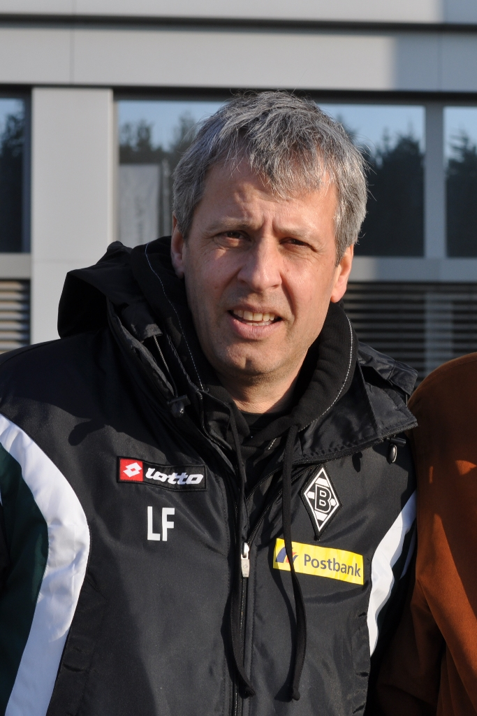 Lucien Favre nach dem Training